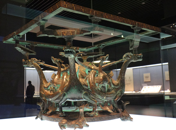 错金银四龙四凤铜方案座